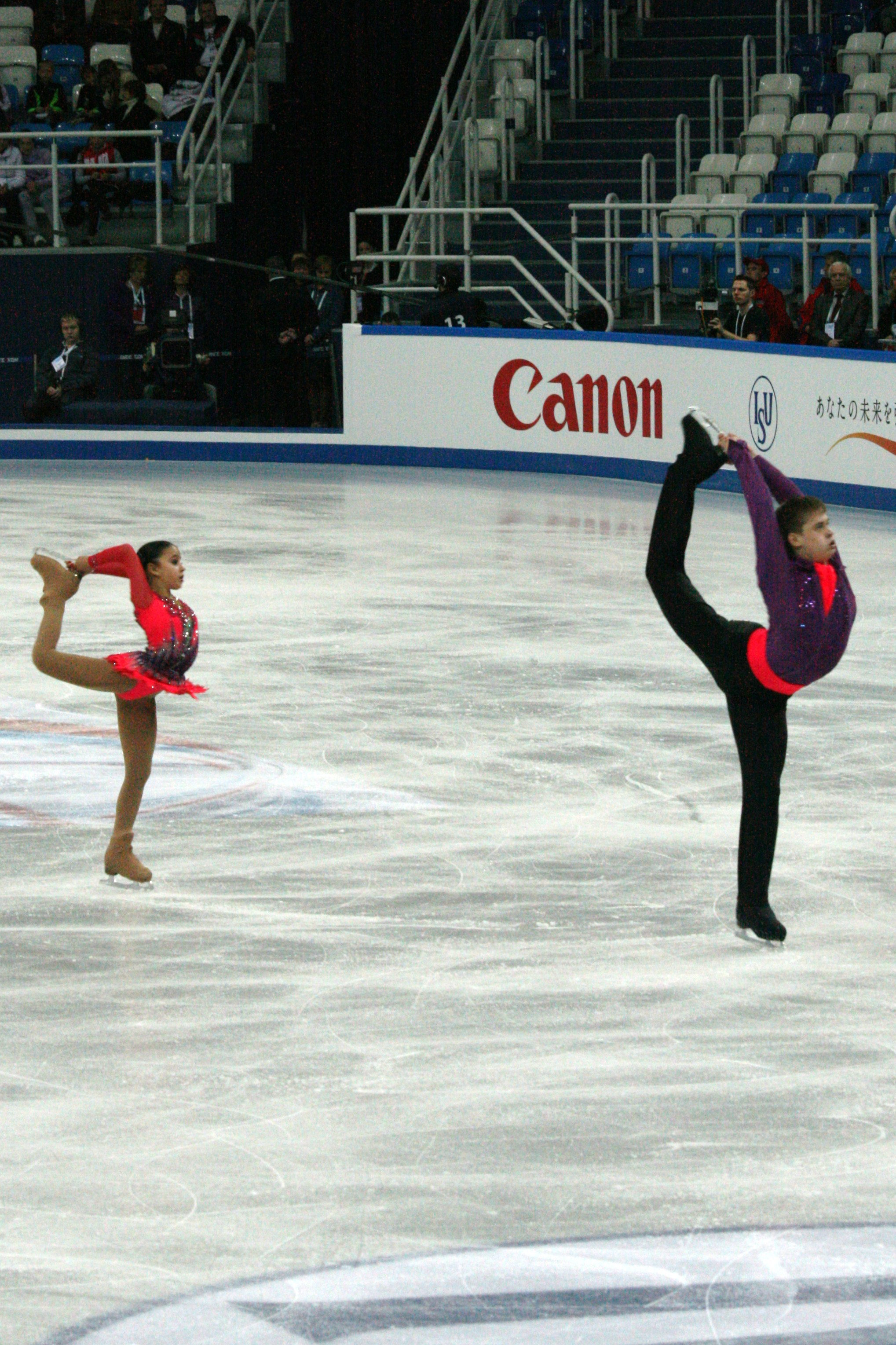 Лина Фёдорова и Максим Мирошкин (Россия) на финале Гран-при среди юниоров 2012-2013. Произвольная программа.